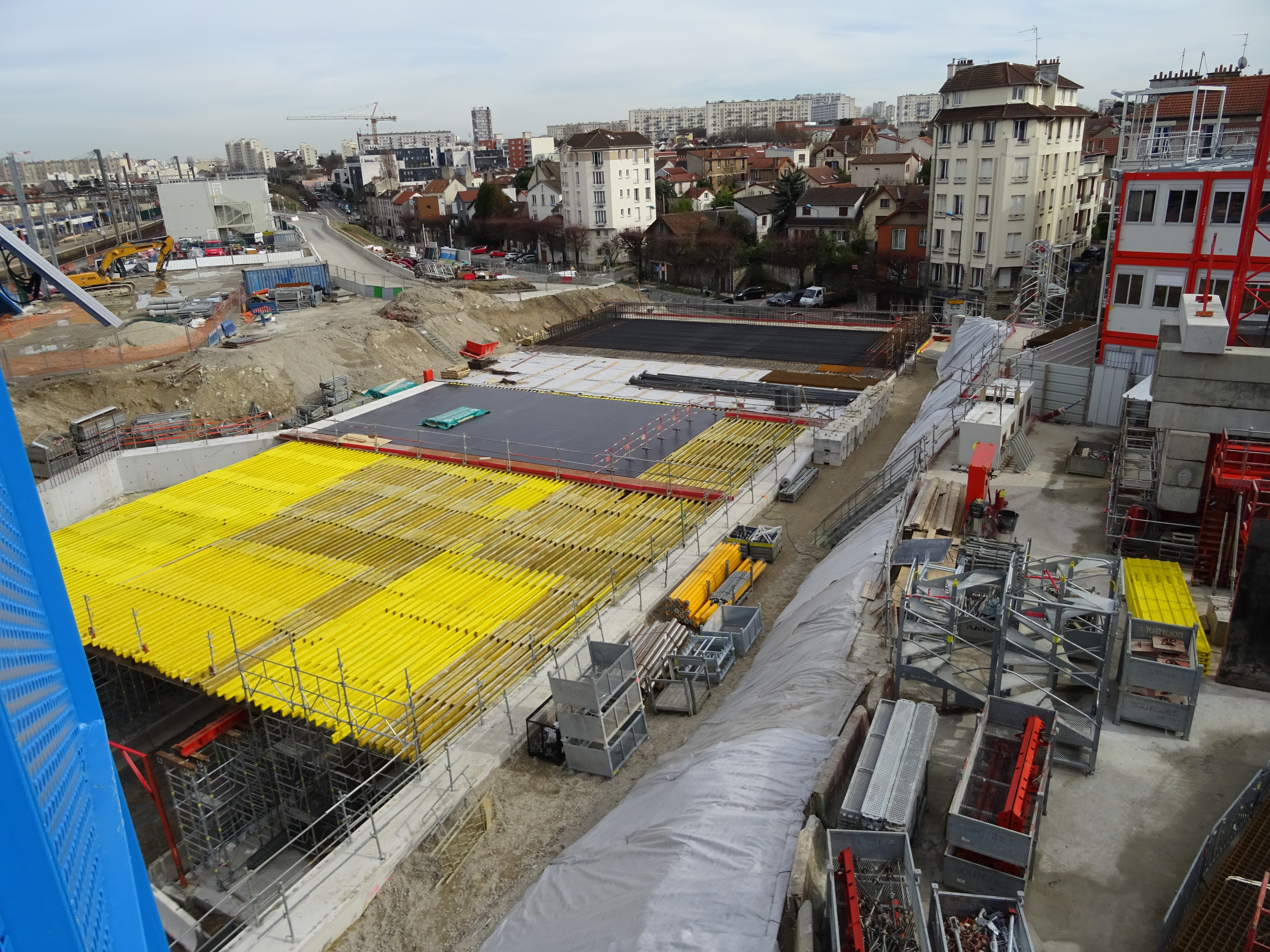 Gare souterraine de Fort d'Issy vue depuis la passerelle de la gare de Clamart